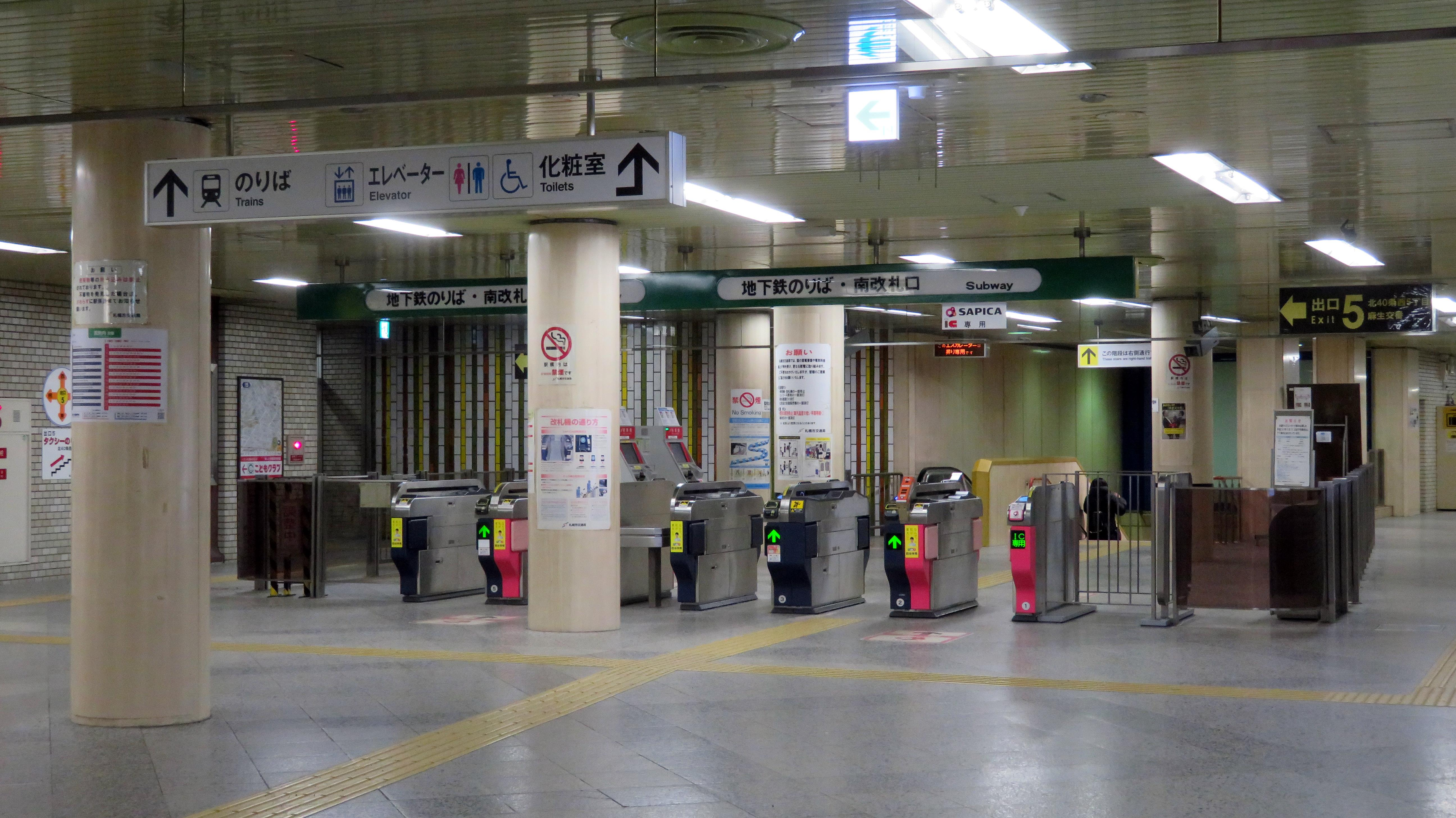 麻生駅南改札口 Canon PowerShot SX720 HS